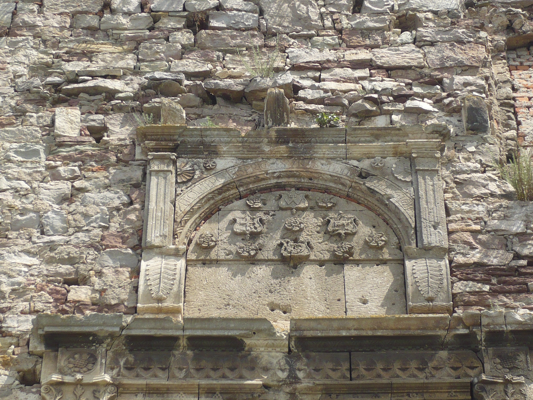 Jazłowiec. Zamek